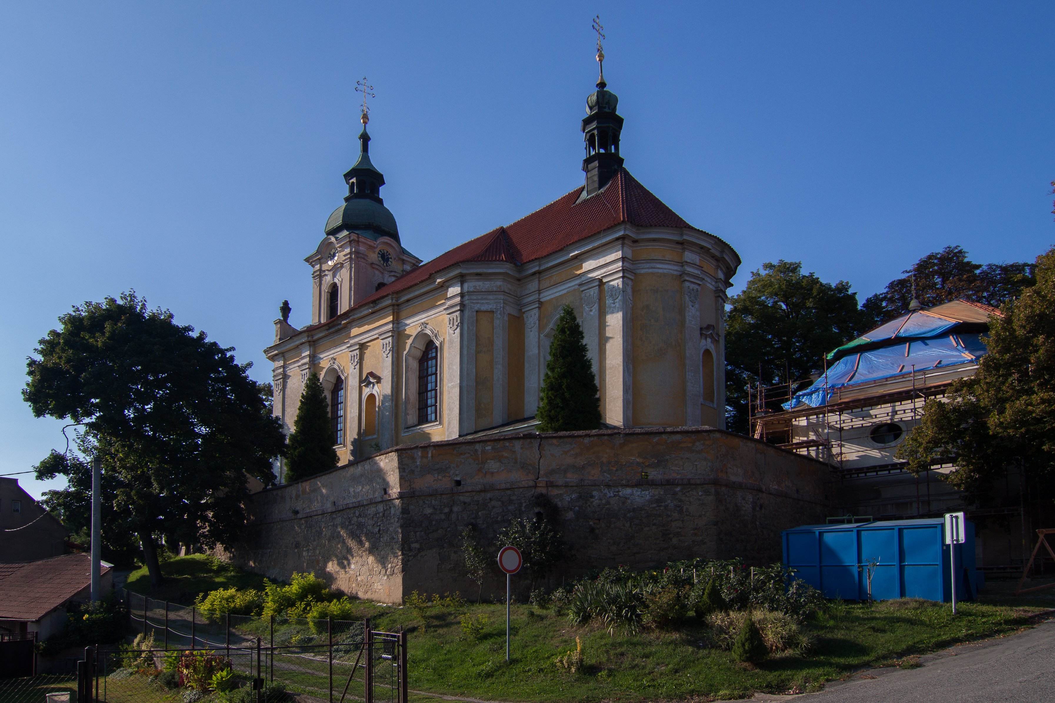 Kostel sv. Václava (Vysoká), náves, Vysoká